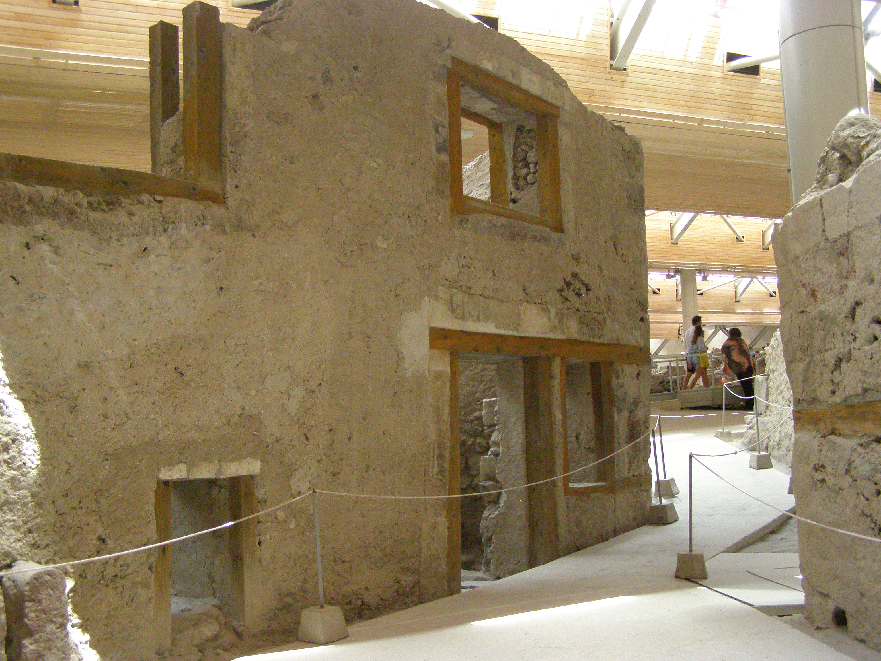 Vchod z Trojúhelníkového náměstí.